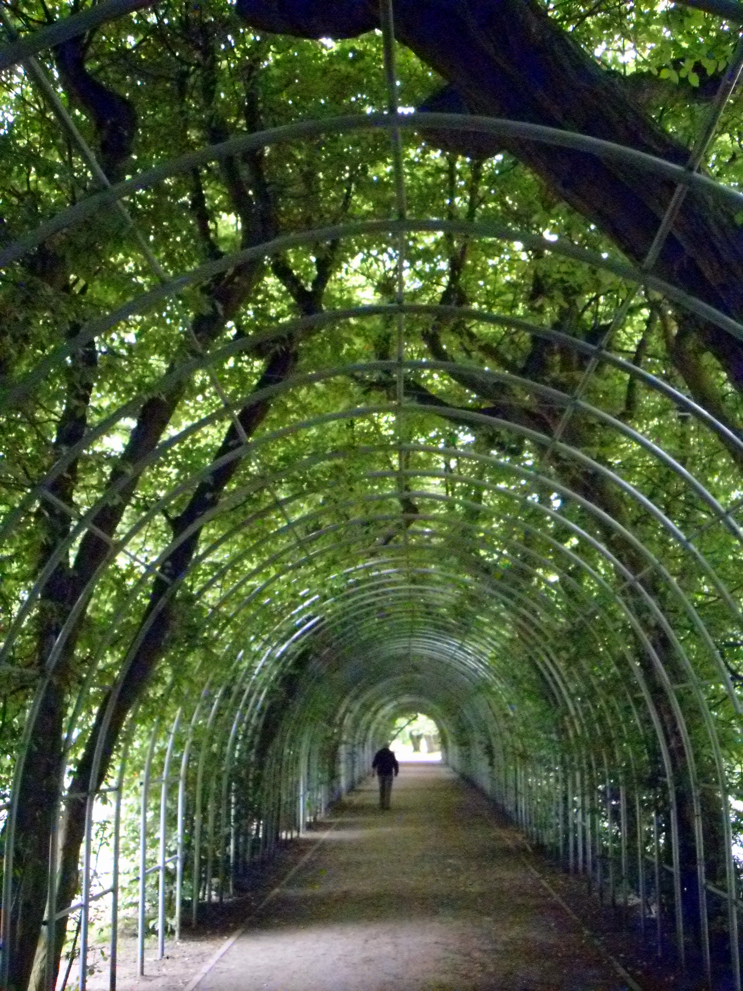 Bindaż w Kołobrzegu.